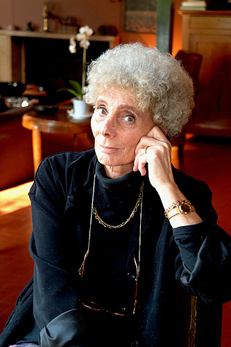 portrait